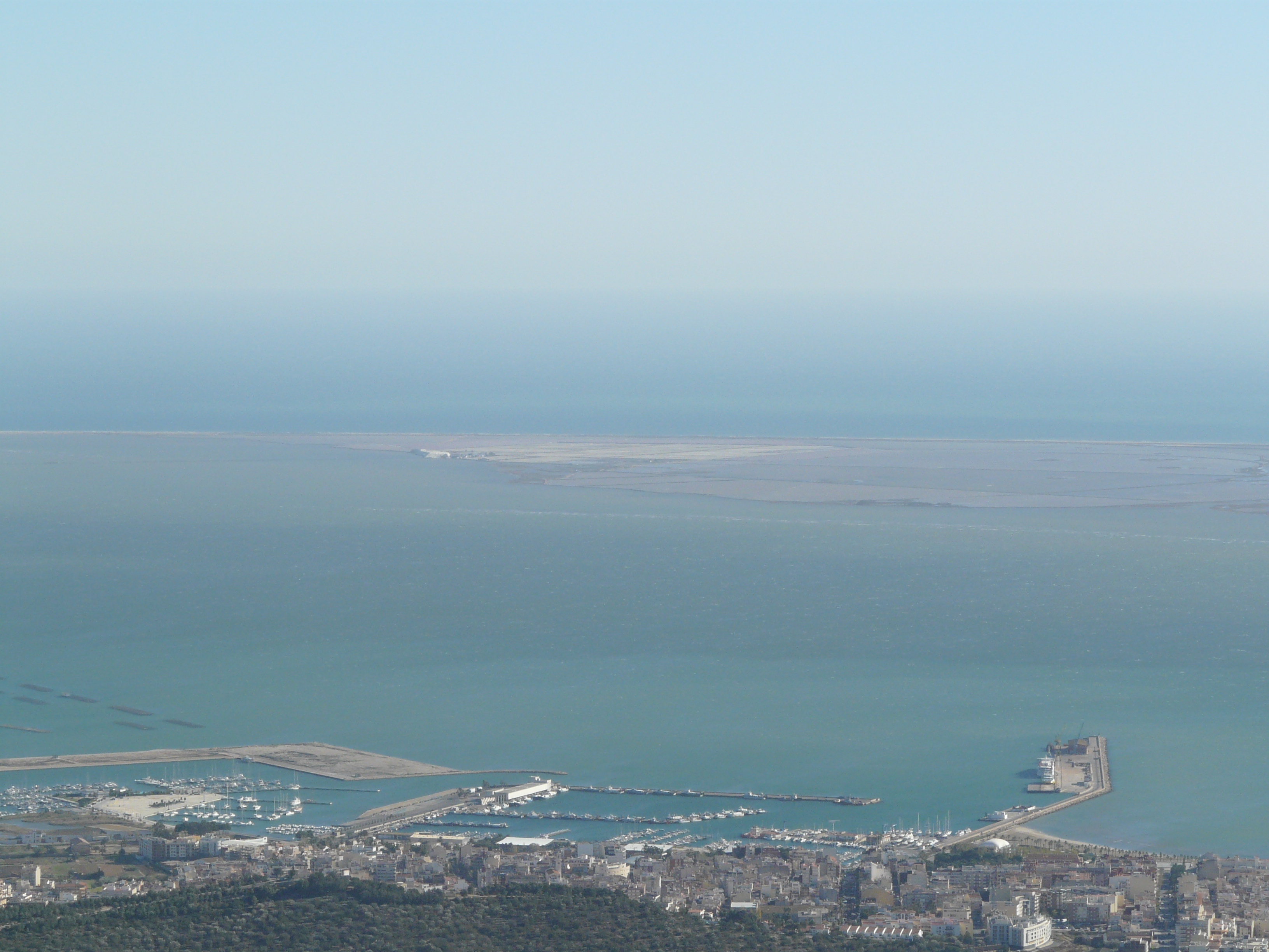 Punta de la Banya (Montsià) (Sant Carles de la Ràpita). Llacunes litorals i aiguamolls. This is a a photo of a wetland in Catalonia, Spain, with id: IZHC-19002208 Object location40° 34′ 22.8″ N, 0° 39′ 14.4″ E